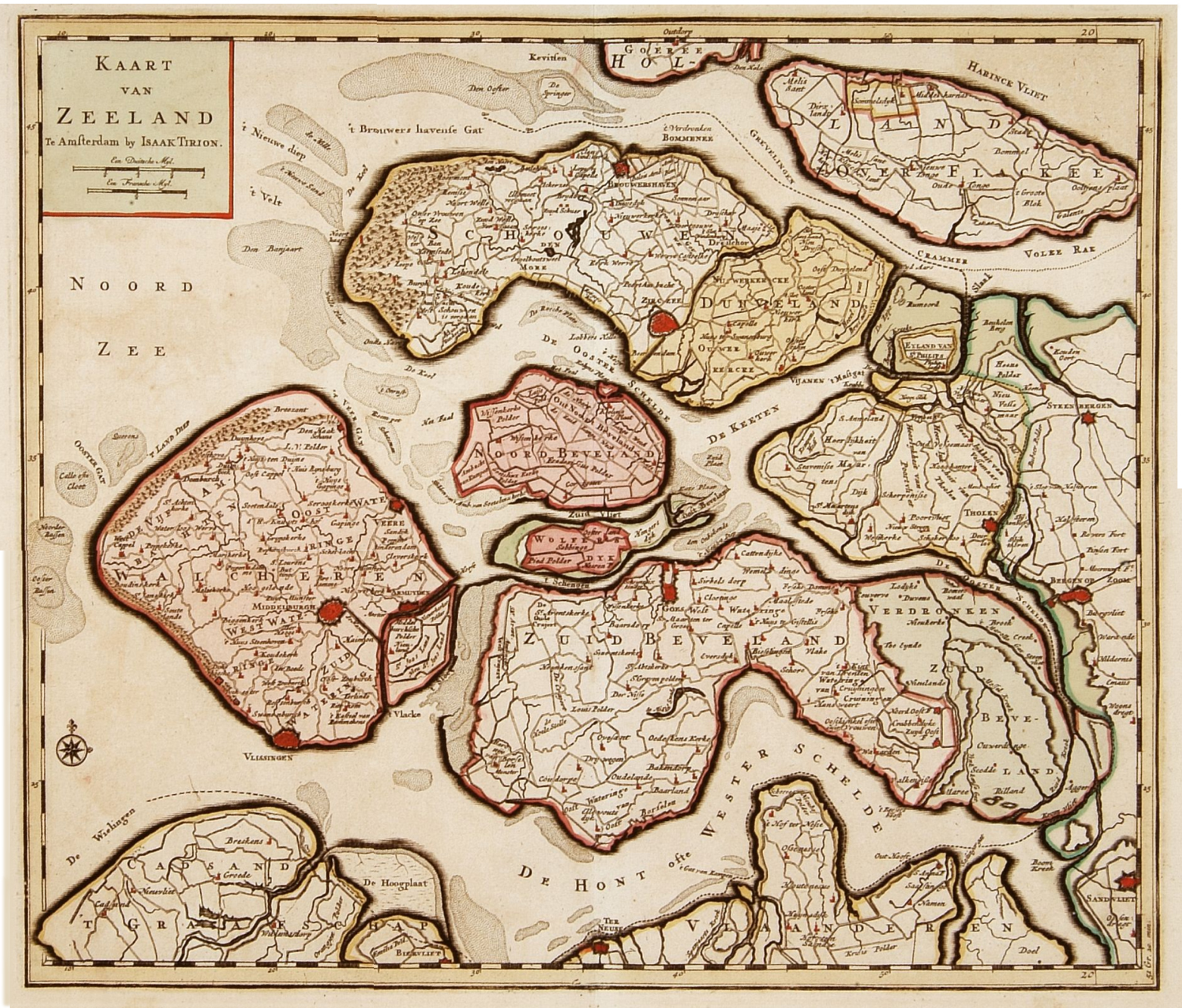 Map of the Dutch province 'Zeeland'; title: Kaart van Zeeland